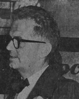 Arkitekten Arne Hagängen